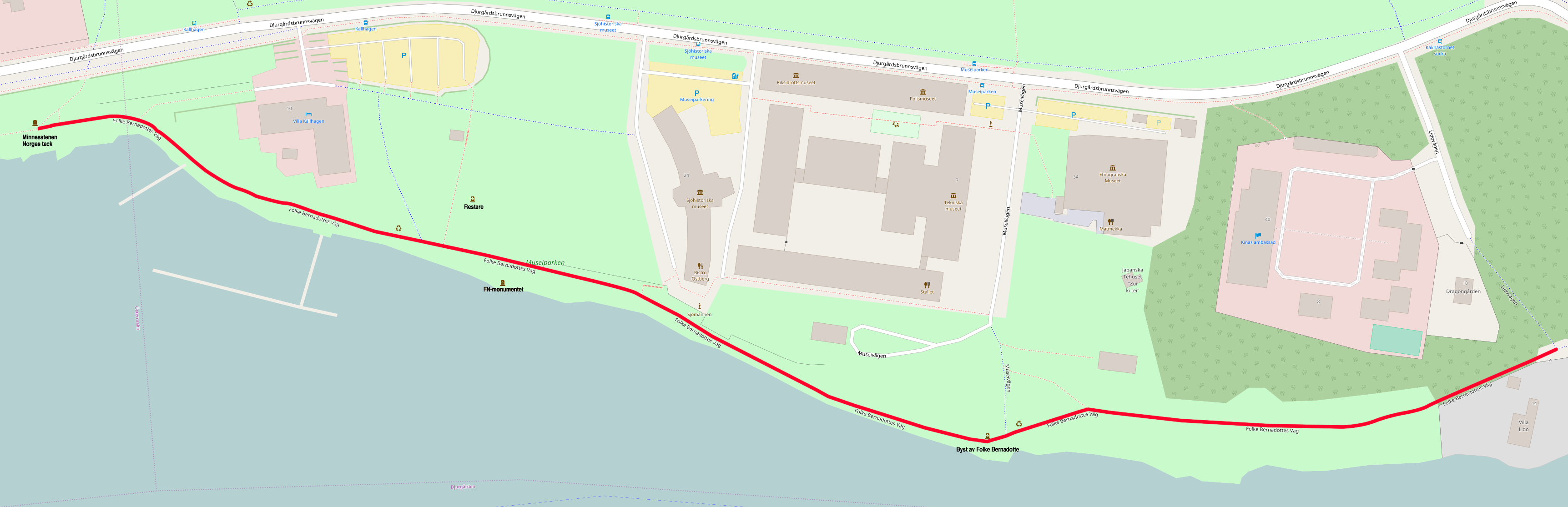 Karta över Folke Bernadottes väg. Data från OpenStreetMap har gjorts tillgänglig under licensen Open Data Commons Open Database License (ODbL).